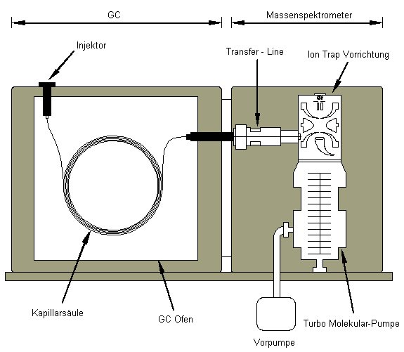 GC/MS-Kopplung mit Ion-Trap-MS